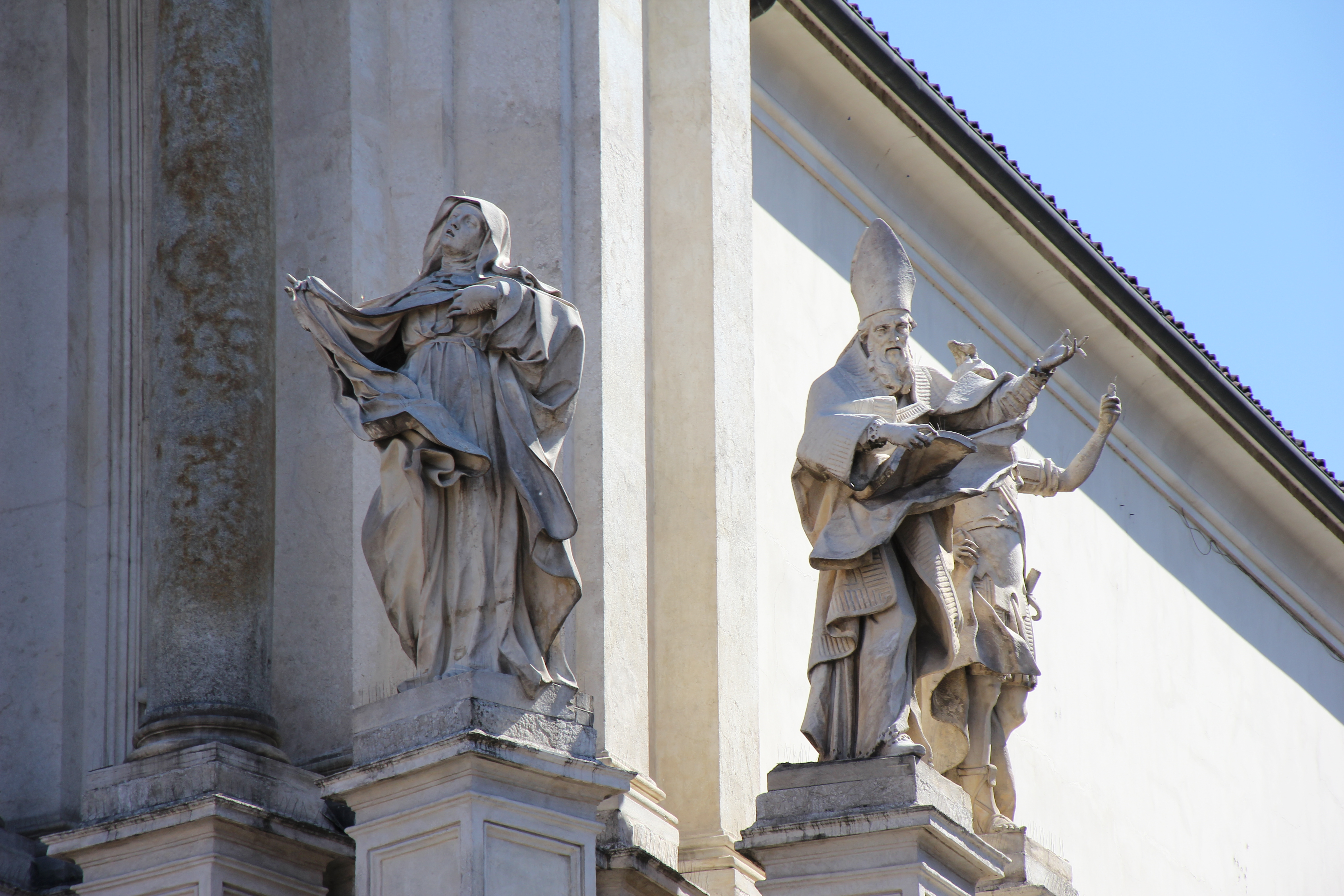 Torino, chiesa di Santa Cristina